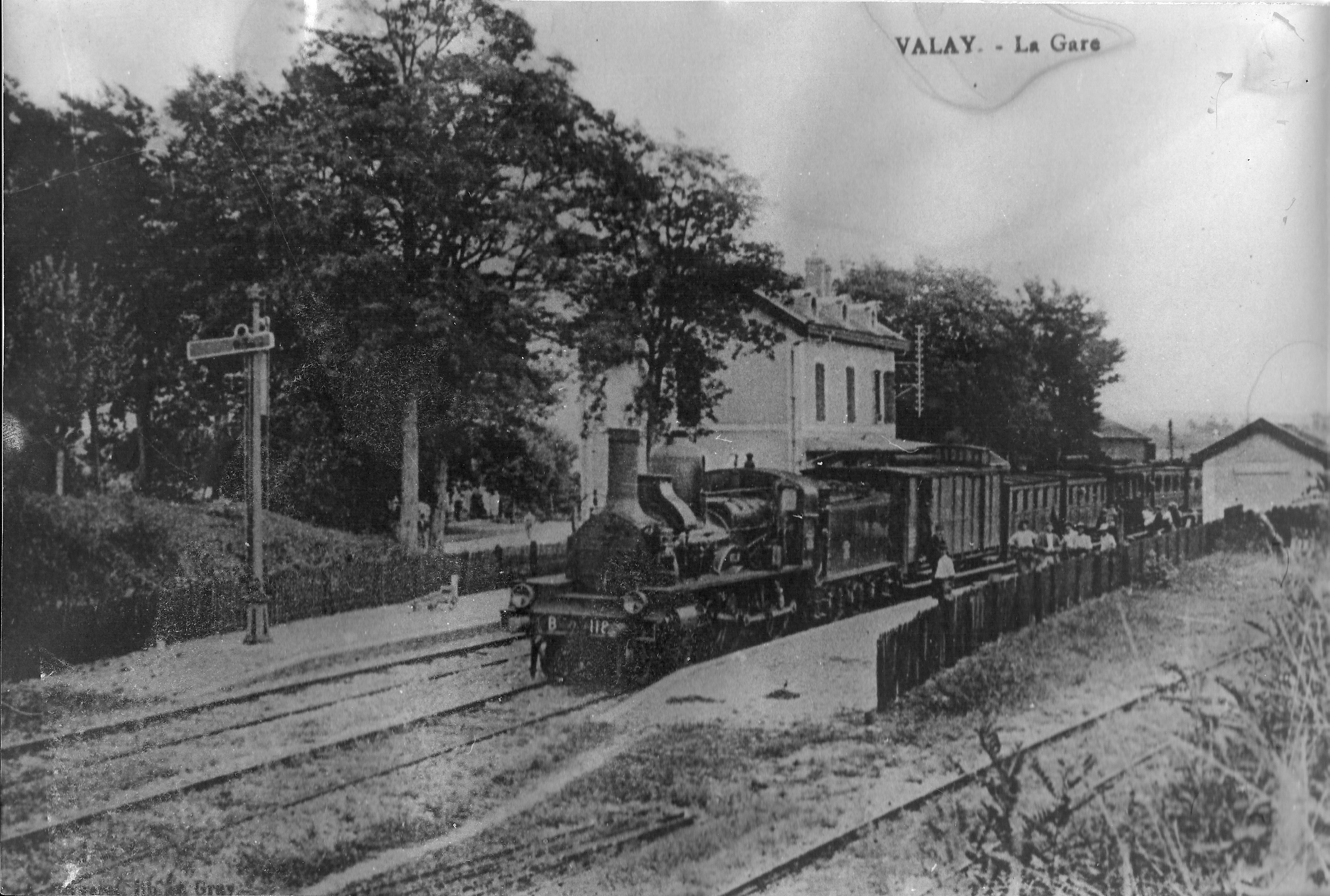 Photographie ancienne éditée à GRAY - Un train desservant la gare de Valay (Haute-Saône) Ligne de Gray à Fraisans